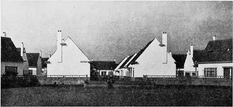 J.J.P. Oud. Woonhuizen, Oud Mathenesse (het Witte dorp), Rotterdam. 19 maart 1923-20 augustus 1924. Foto afkomstig uit Bouwkundig Weekblad, 45e jaargang, nummer 43 (25 oktober 1924): p. 418.